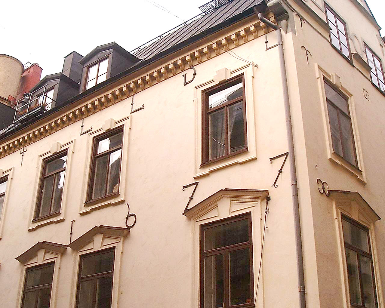 Wall displaying "LL DL 1627" at 70, Västerlånggatan. Gamla stan, Stockholm.